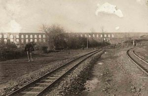 Karadeniz sahra hatti